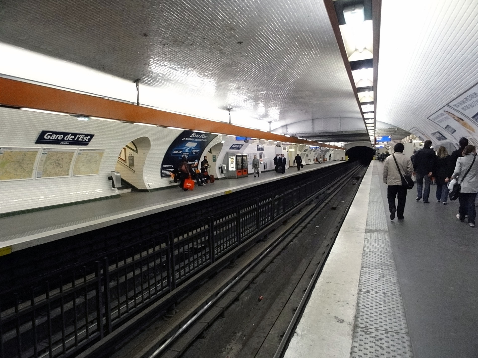 La station Gare de l'Est de la ligne 4 du métro de Paris, France